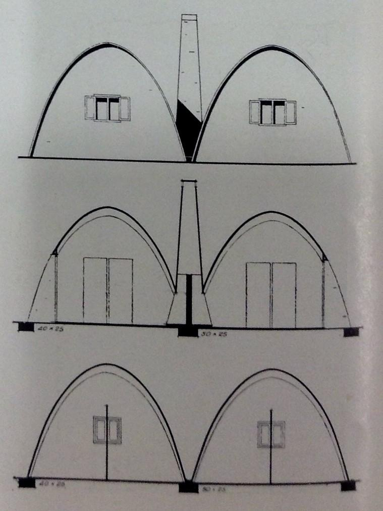 vista de las viviendas del proyecto ctesifonte